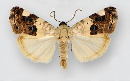 Acontia geminocula male